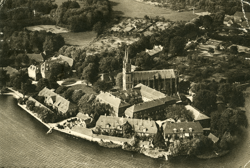 Postkarte, Luftaufnahme des Klosters Dobbertin